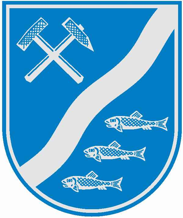 Wappen der Stadt Heringen